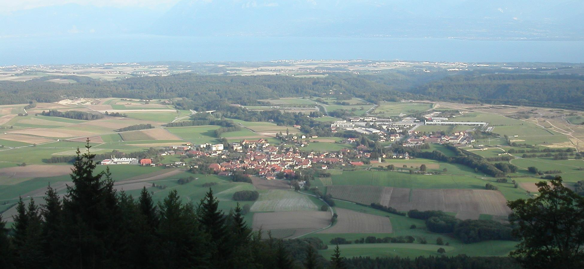 Vue du village de Bière, canton de Vaud, Suisse.